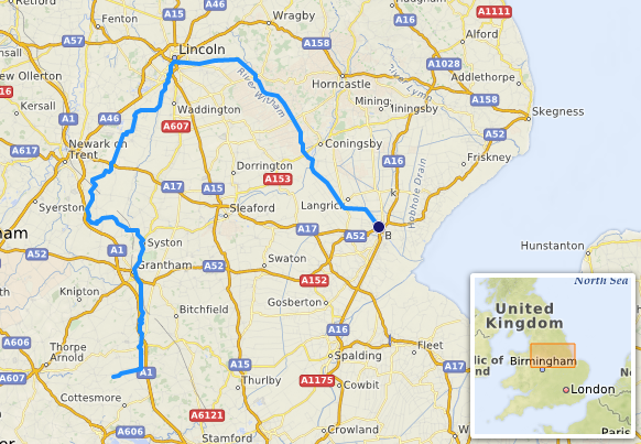 carte réalisée sur umap [1] This map may be incomplete, and may contain errors. Don't rely solely on it for navigation.